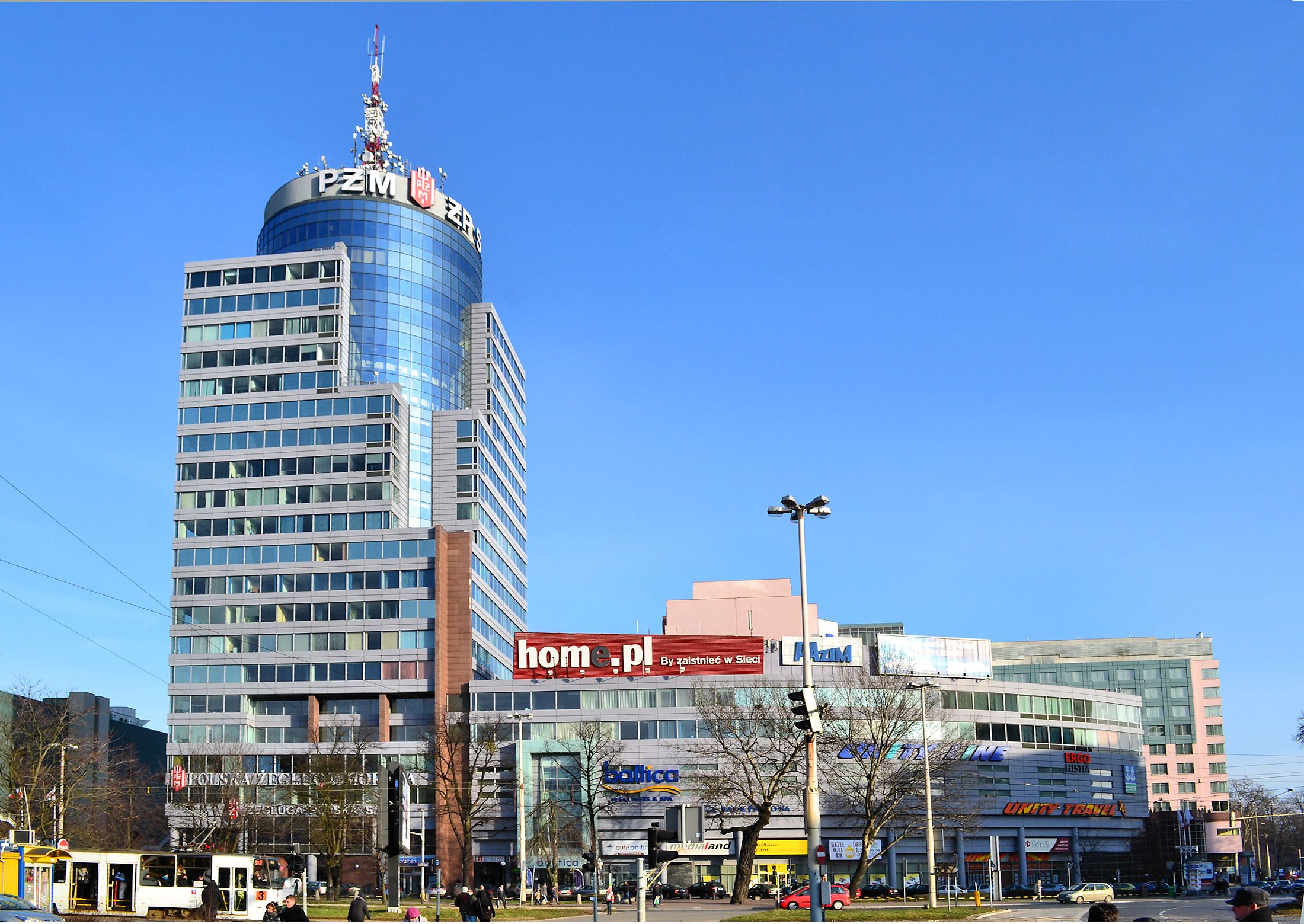 Gmach PAZIM w Szczecinie